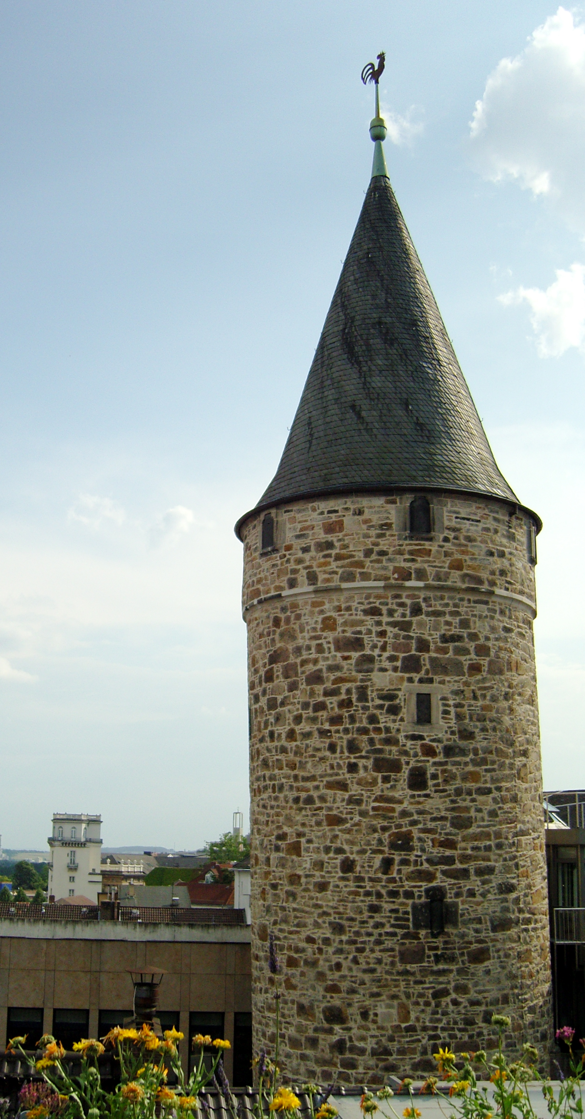 Die obere Partie des Druselturms in Kassel von einem benachbarten Gebäude aus.